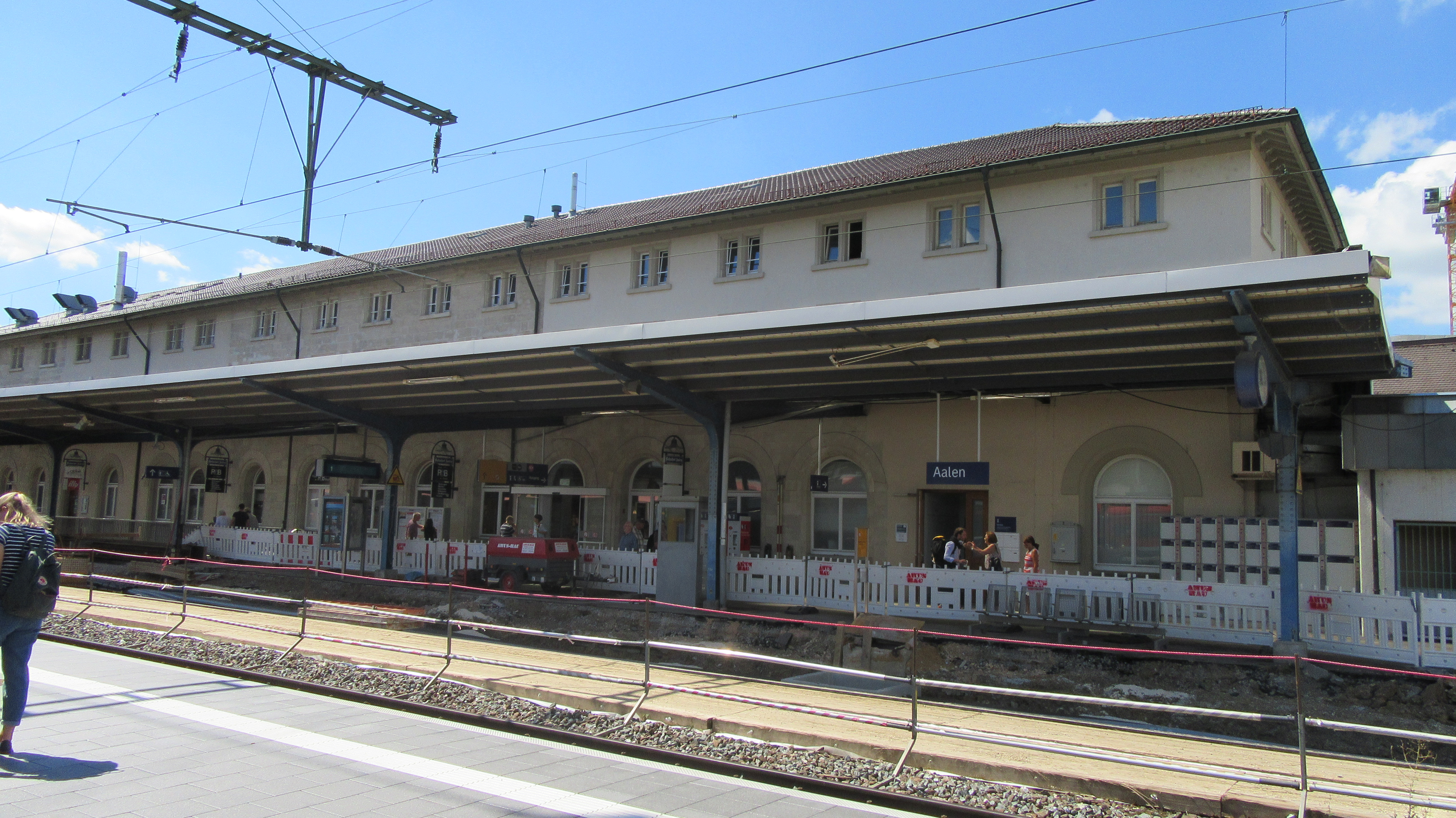 Empfangsgebäude des Bahnhofs Aalen während des Bahnhofsumbaus am 13. August 2016